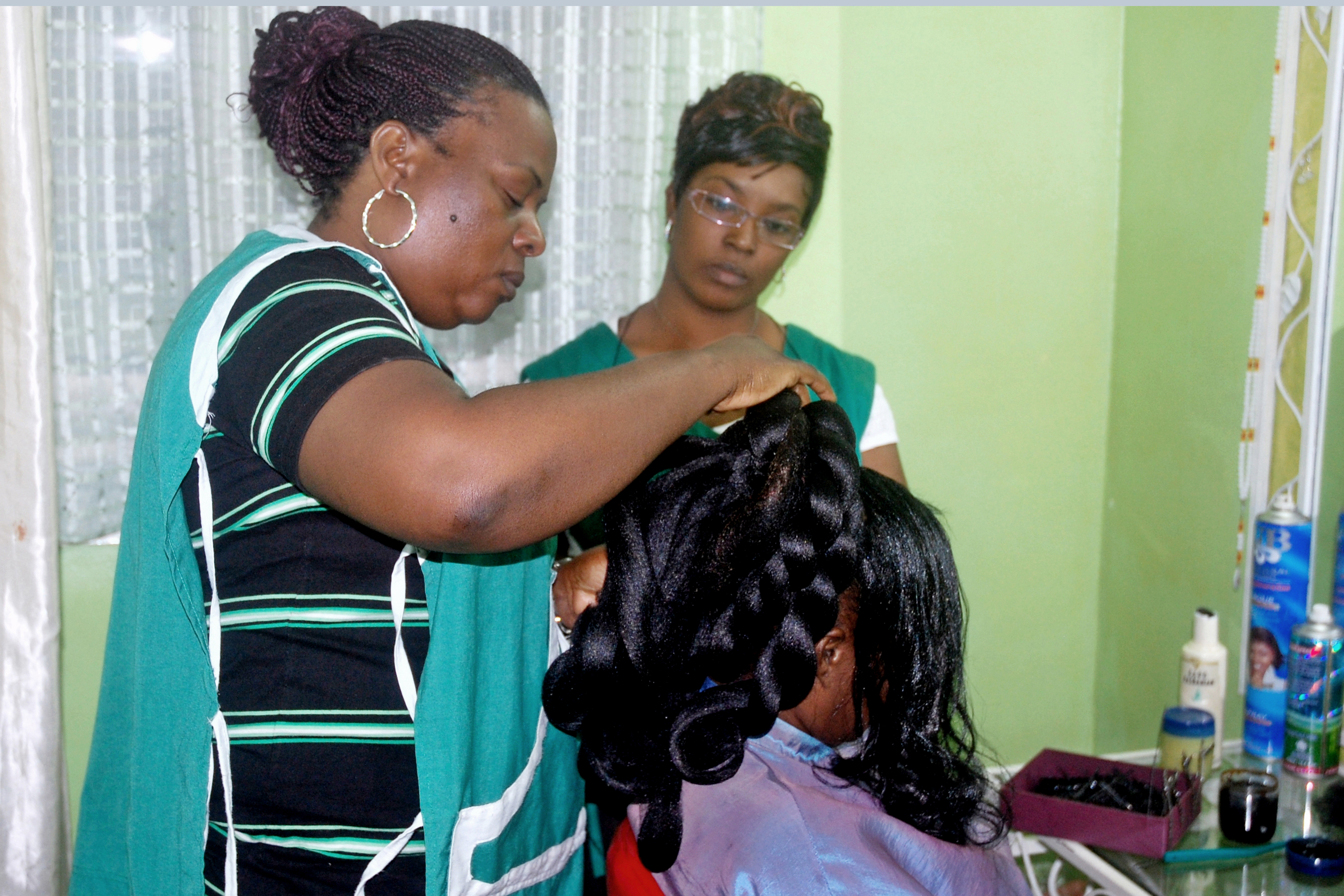 une coiffeuse à Abidjan This is an image of "African people at work" from Ivory Coast